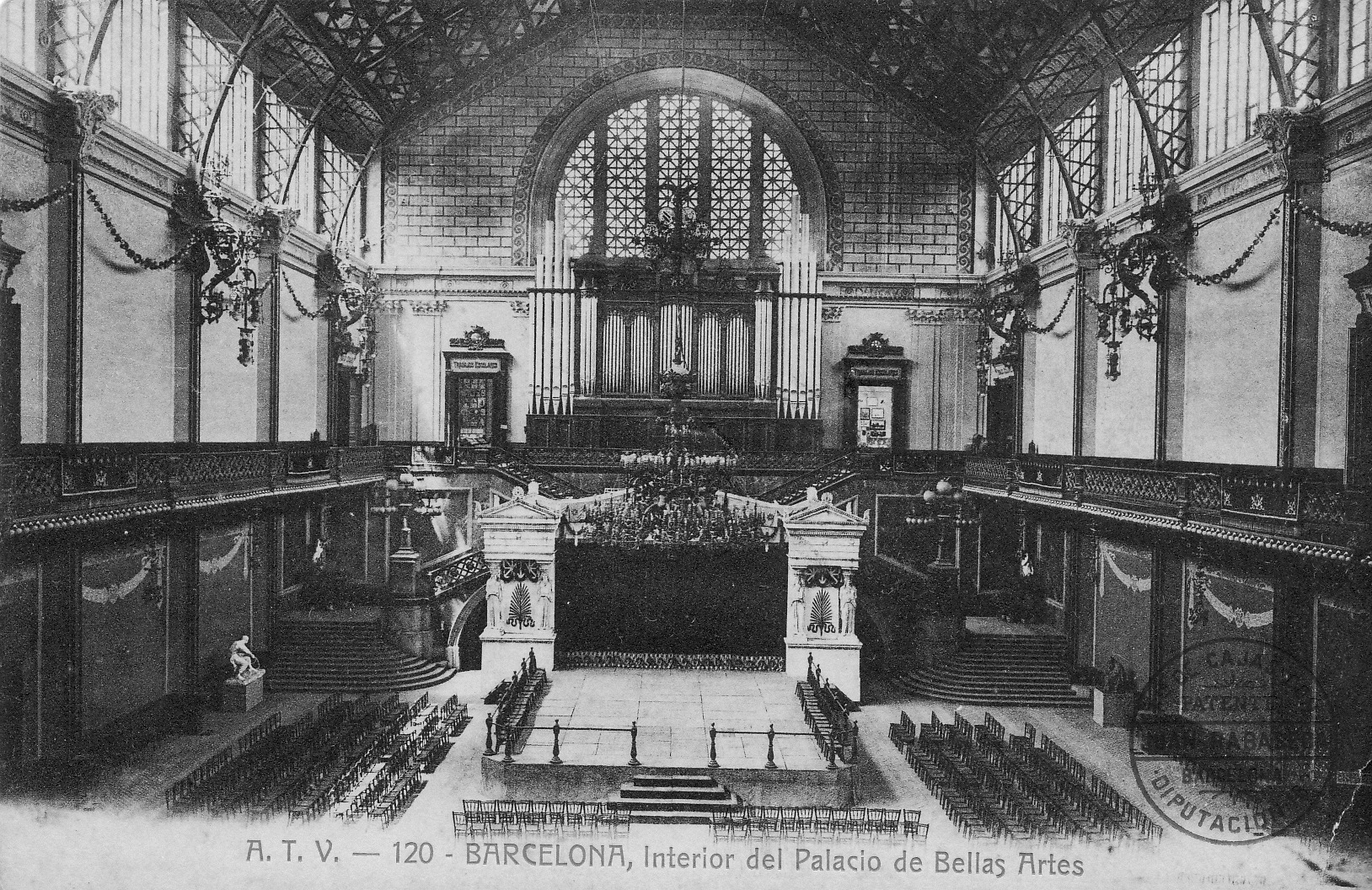 Interior del Palau de Belles Arts (Barcelona-Catalunya), obra d'August Font i Carreras fet en 1888 per a l'Exposició Universal de Barcelona-1888. Enderrocat en 1942.